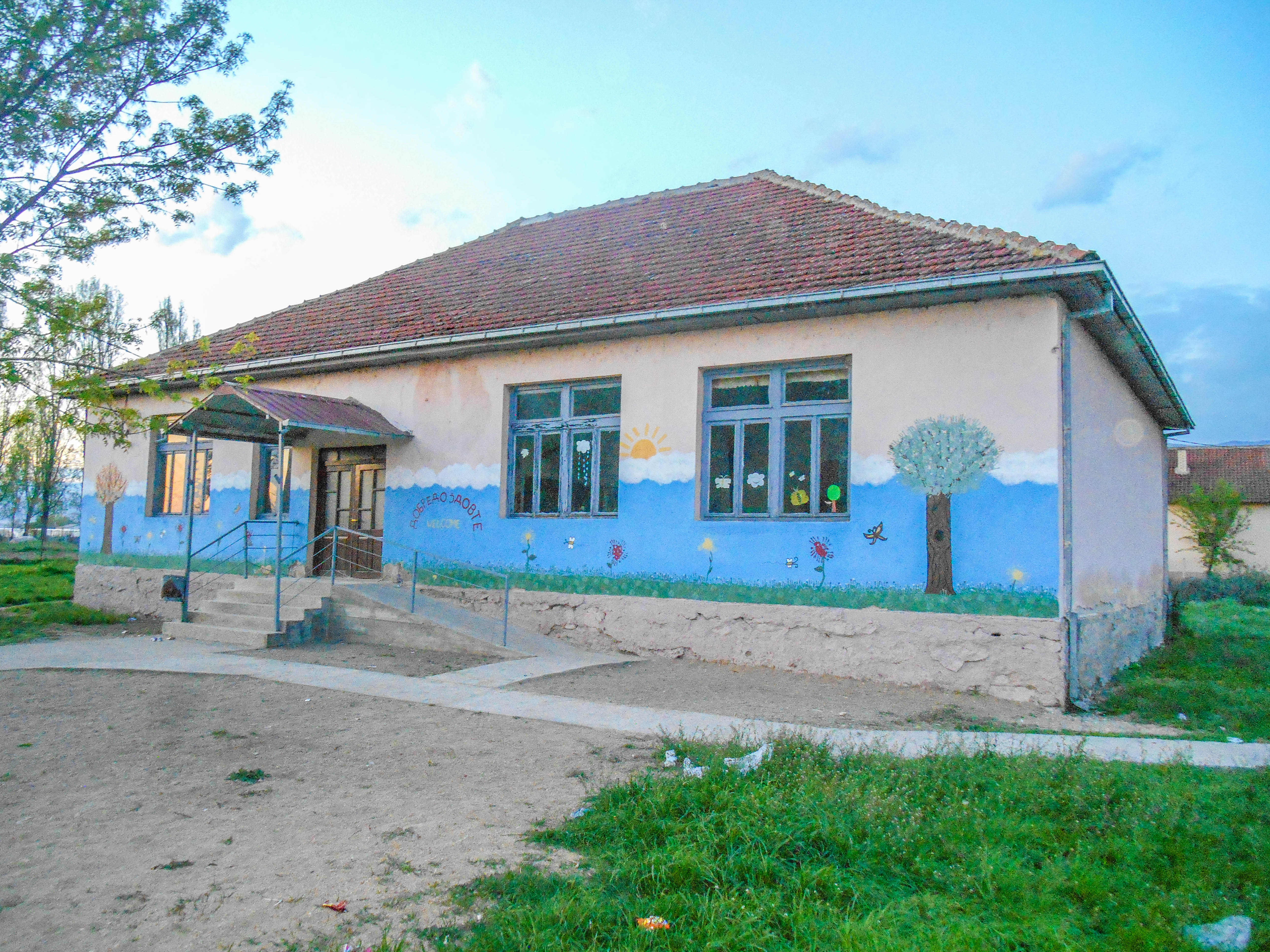 Основно училиште „Св. Кирил и Методиј“ - Радово